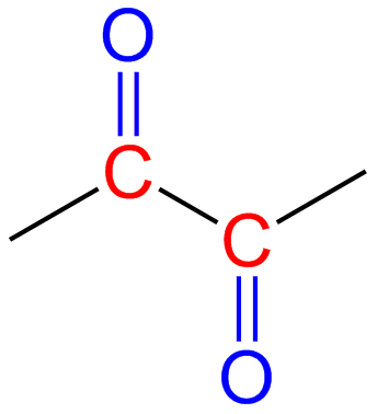 Butaandion: beide carbonylgroepen (blauw) zitten gesubstitueerd op naburige koolstofatomen (rood); vicinale substitutie